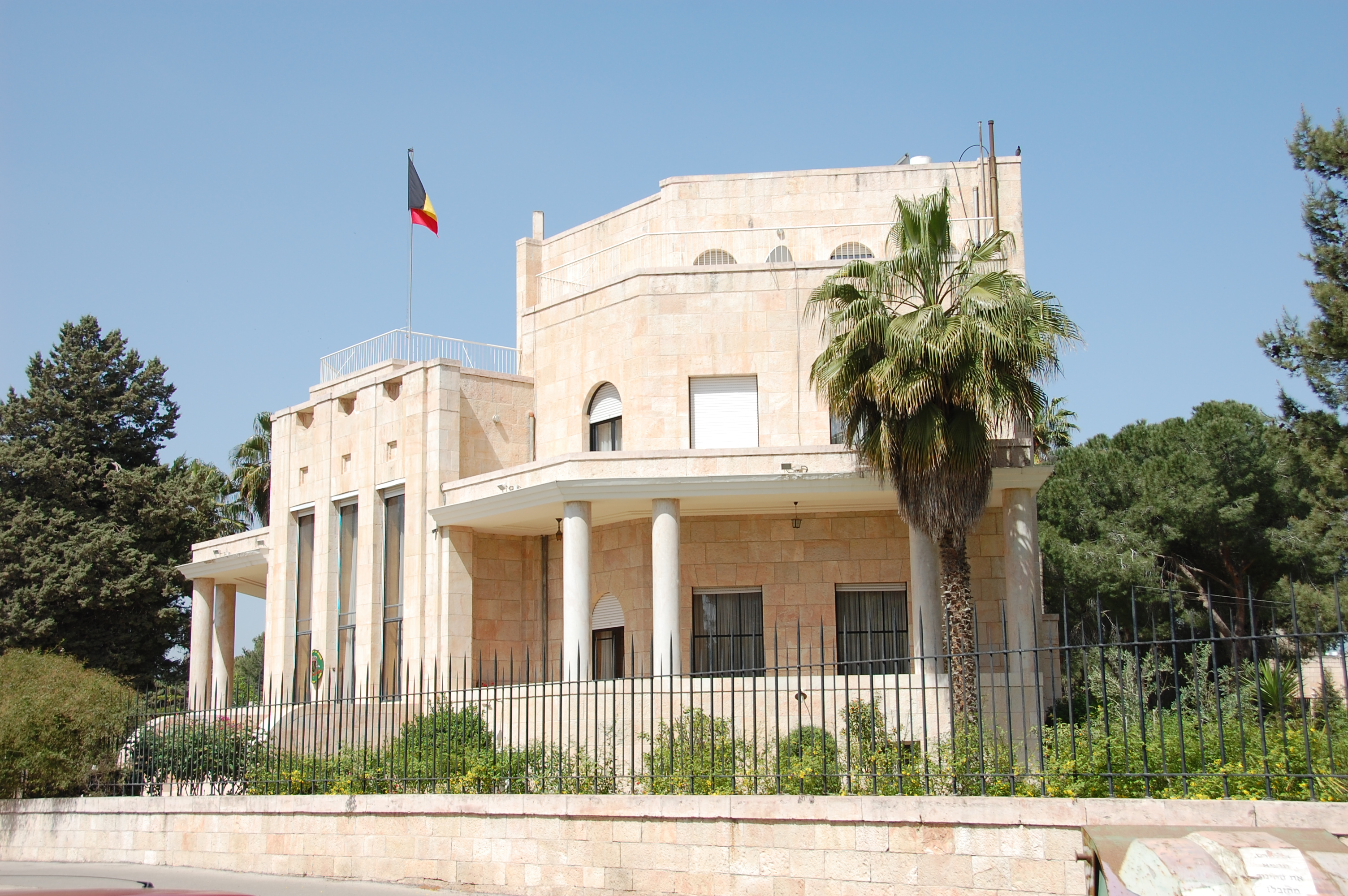 Villa Salameh - Belgian Consulate